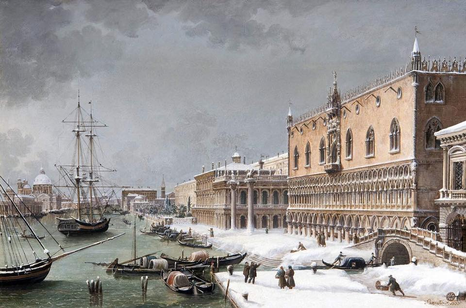 Художник венецианской школы